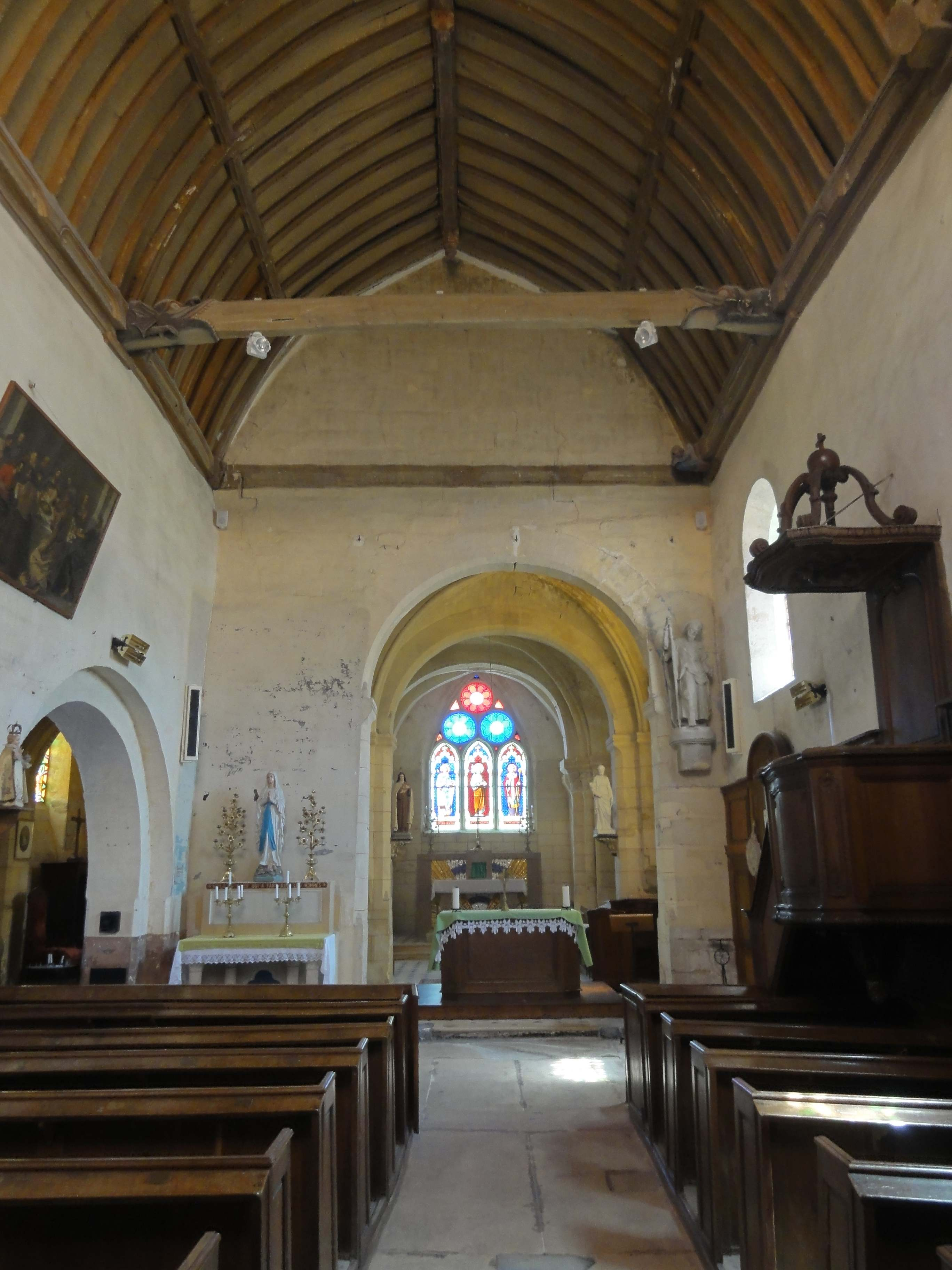 Intérieur de l'église Saint-Martin de Labbeville (voir titre).